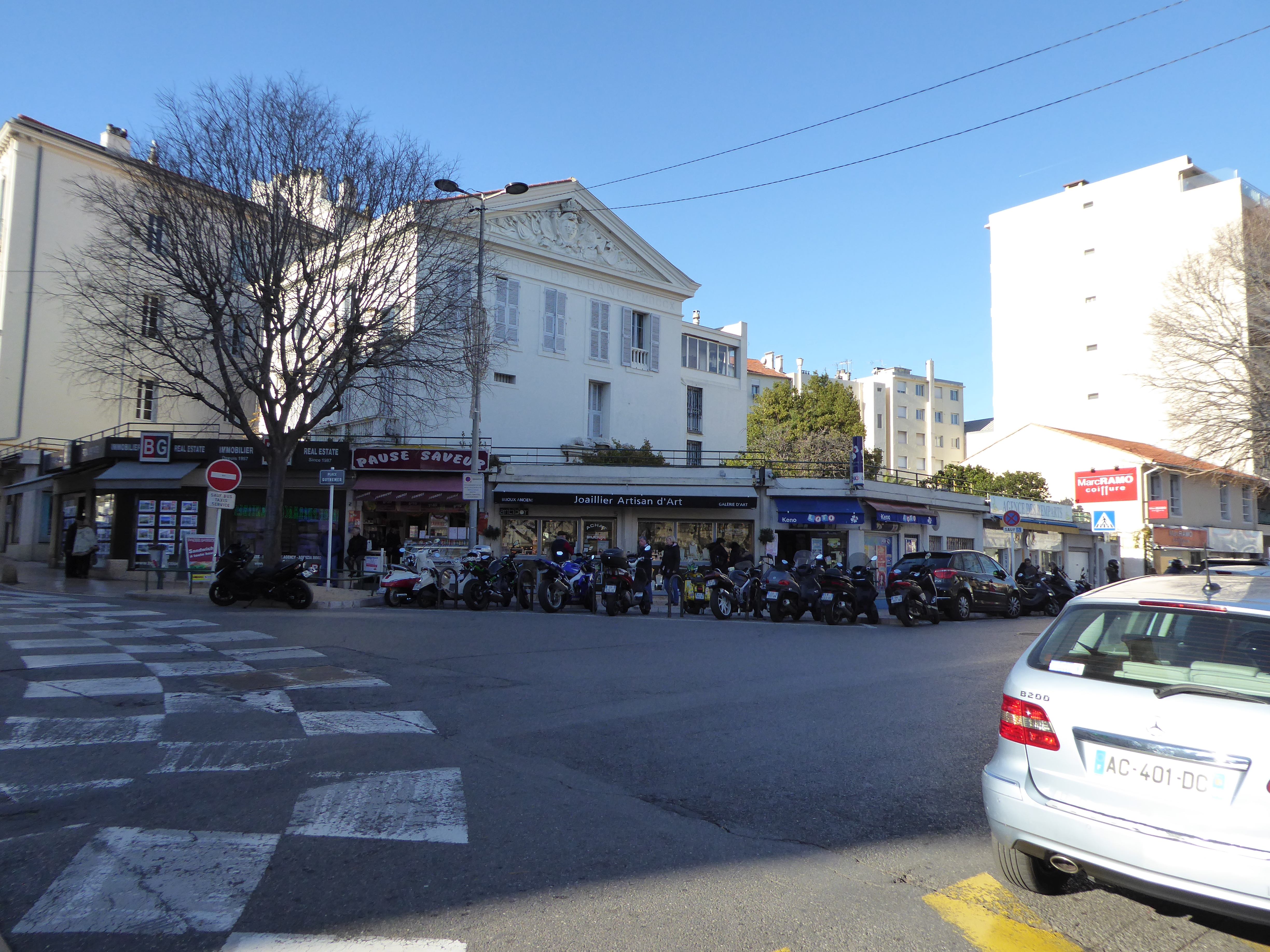 streets in Antibes